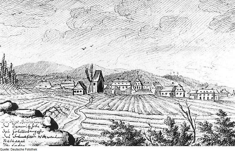 Original image description from the Deutsche Fotothek Herrnhut. Ortsansicht mit Windmühle, Zeichnung von Johann Gottfried Schultz, 27.8.1765 (Görlitz, Graph. Kabinett, Skizzenhefte)